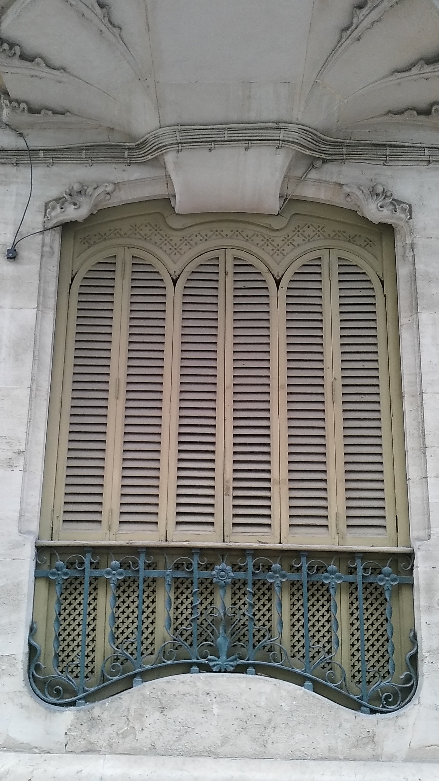 Casa Laporta en Alcoy (Alacant).